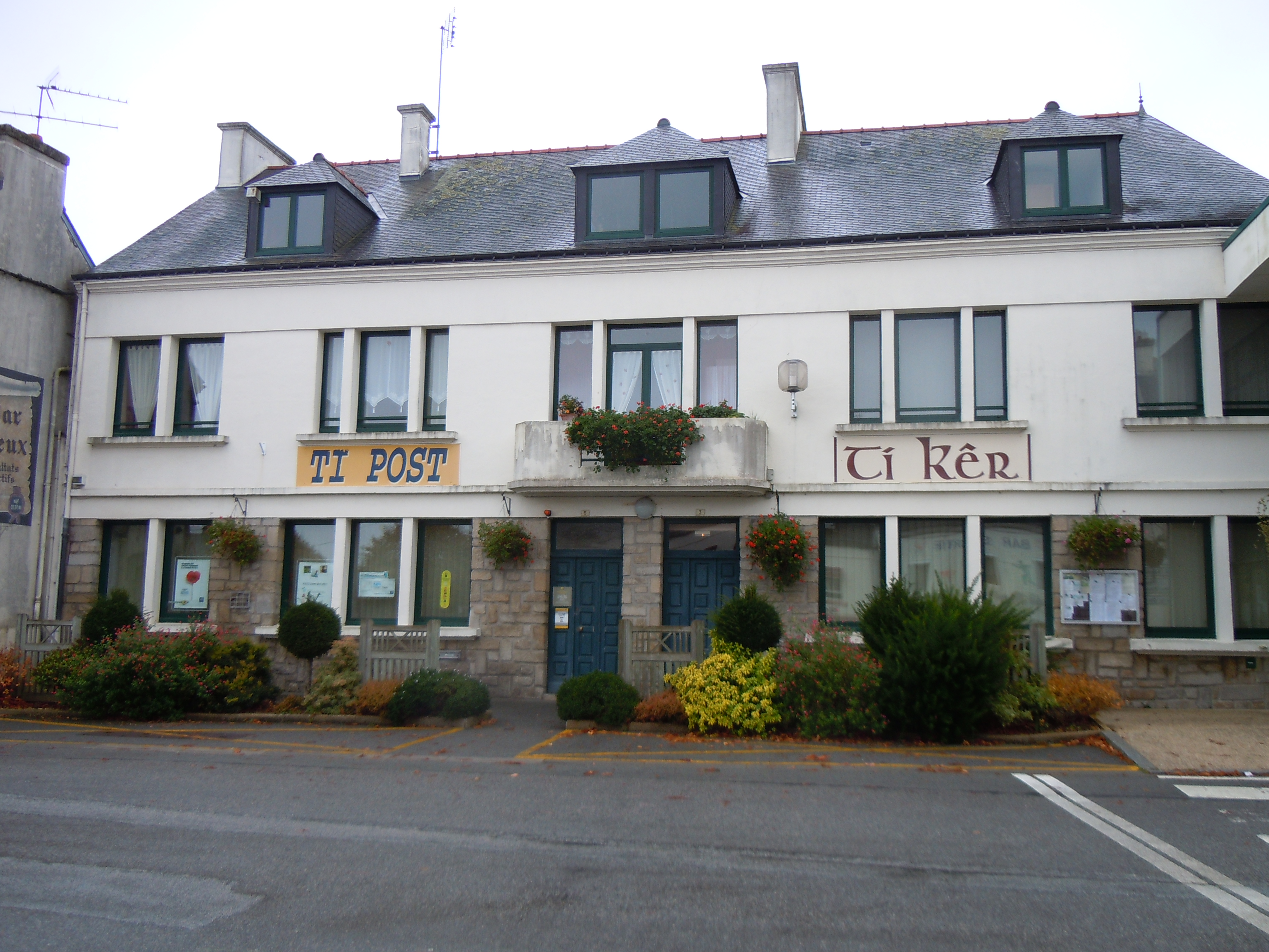 la mairie et le bureau de poste de Langonnet